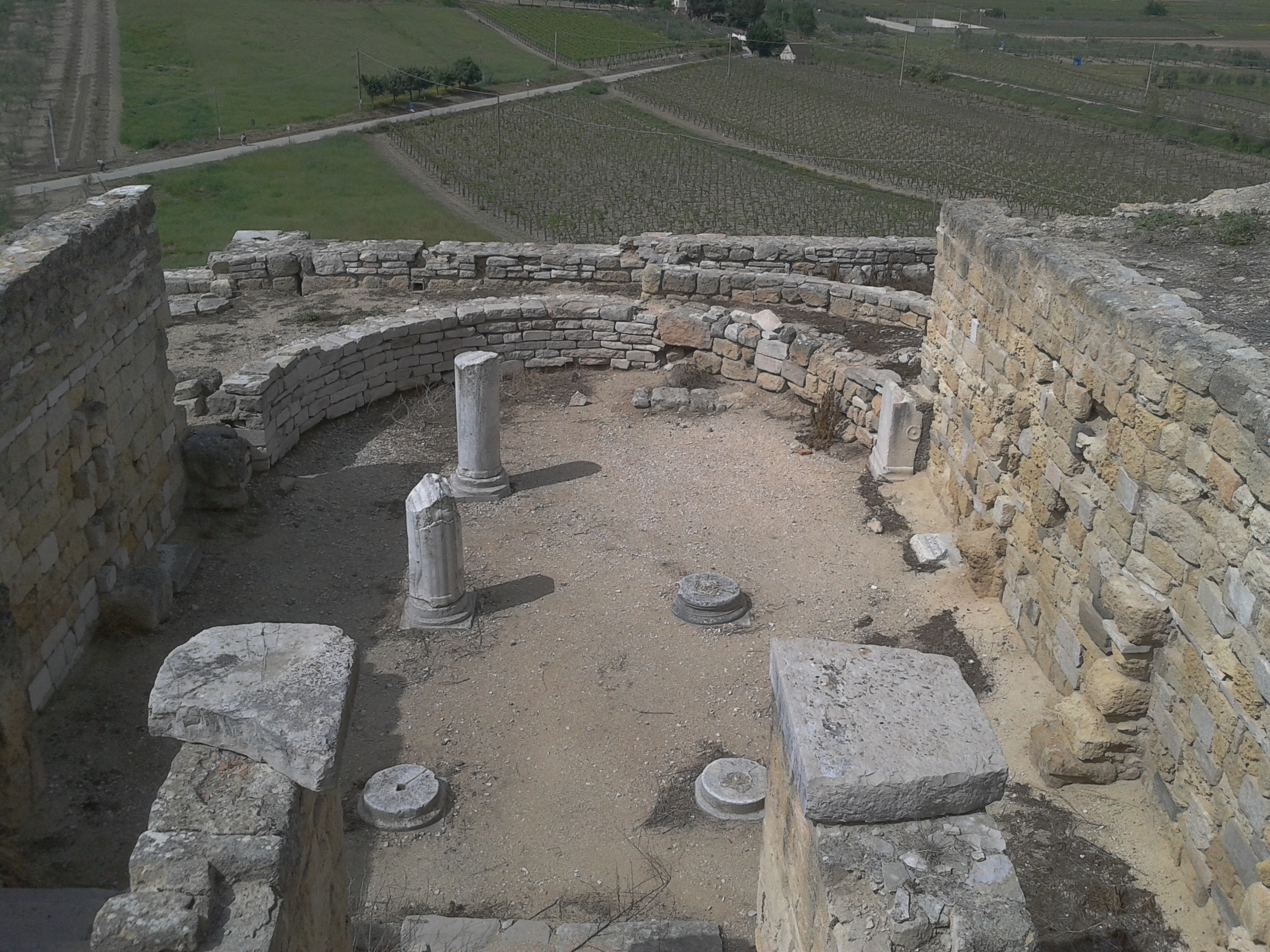 Area archeologica e Antiquarium di Canne della Battaglia - MIBAC This is a photo of a monument which is part of cultural heritage of Italy.